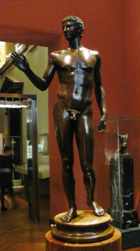 Wien, Kunsthistorisches Museum, Jüngling vom Magdalensberg, Kopie aus dem 16. Jh. (Original seit ca. 1810 verschollen)